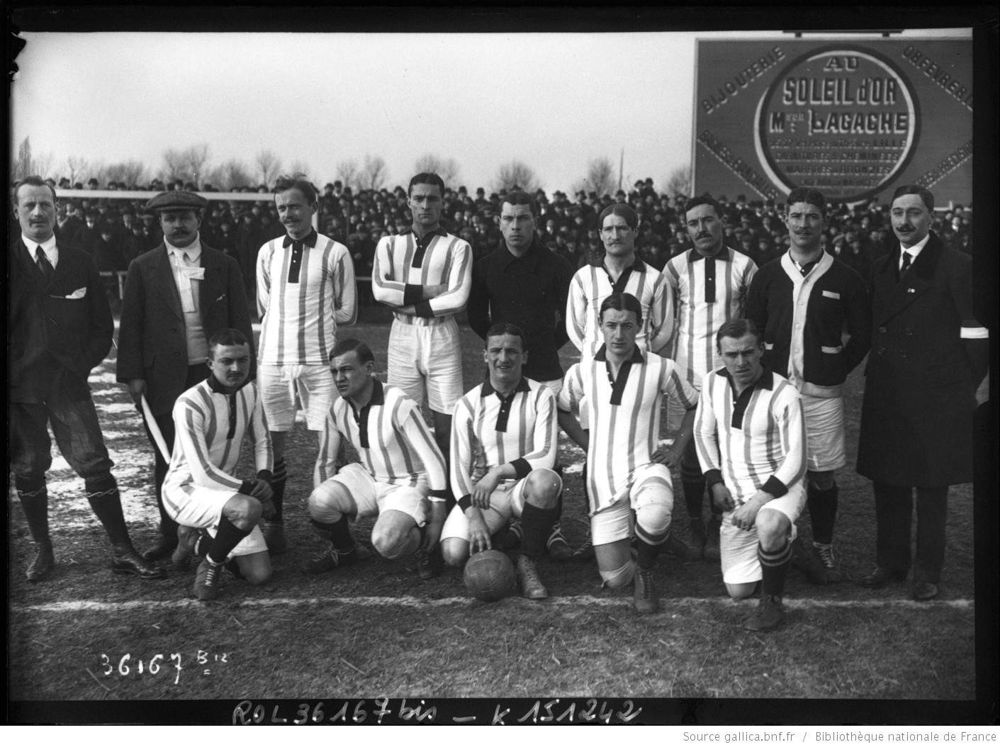 25 janvier 1914, Lille (stade Victor-Boucquey), équipe de France de football. Debout : l'arbitre M. Mortimer, le juge de touche français, Gabriel Hanot (US Tourcoing), Émilien Devic (Red Star), Pierre Chayriguès (Red Star), Jean Ducret (Olympique Lillois, capitaine), Gaston Barreau (FEC Levallois), Lucien Gamblin (Red Star), x. Accroupis : Henri Lesur (US Tourcoing), Henri Bard (Racing Club de France), Étienne Jourde (CS Athlétiques), Paul Chandelier (Olympique Lillois), Raymond Dubly (RC Roubaix).